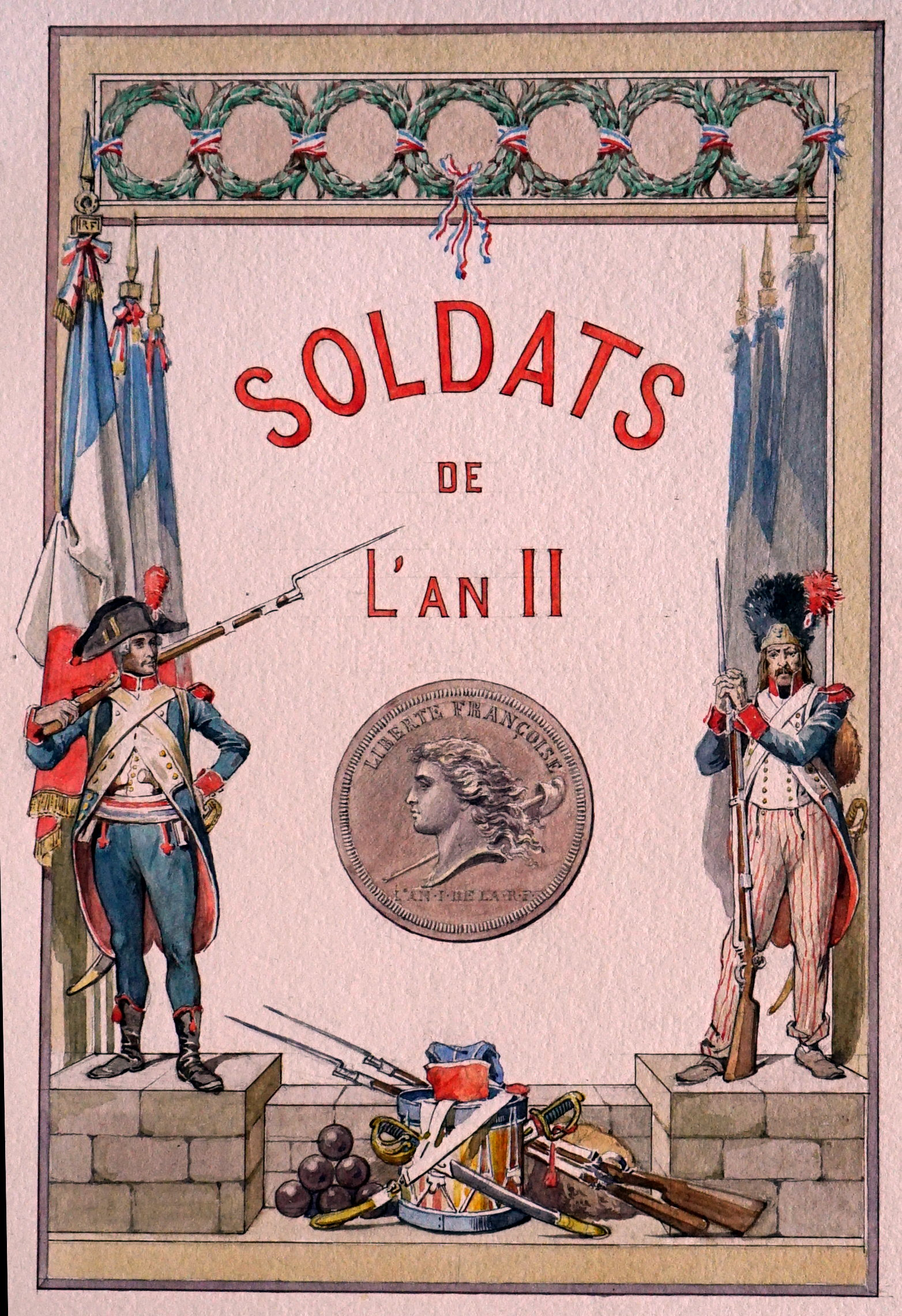 oeuvre calligraphiée et décorée par Auger pour Diancourt.